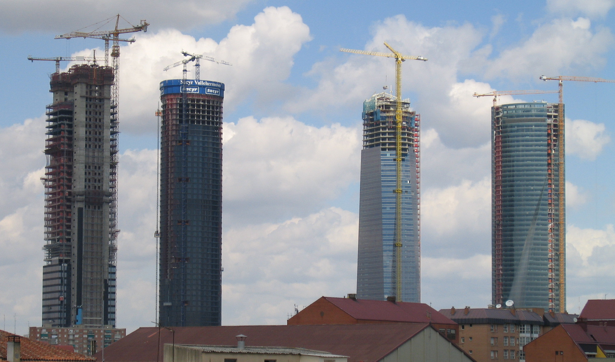 CTBA Madrid